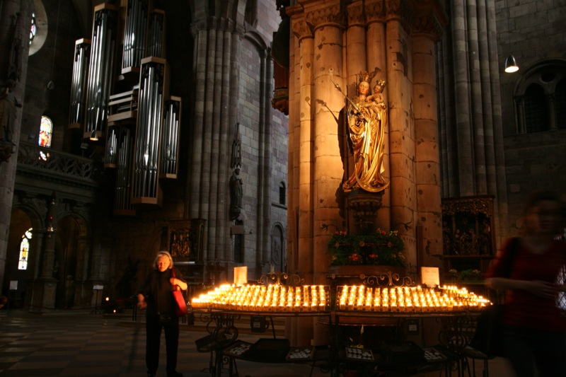 Dom von Freiburg.